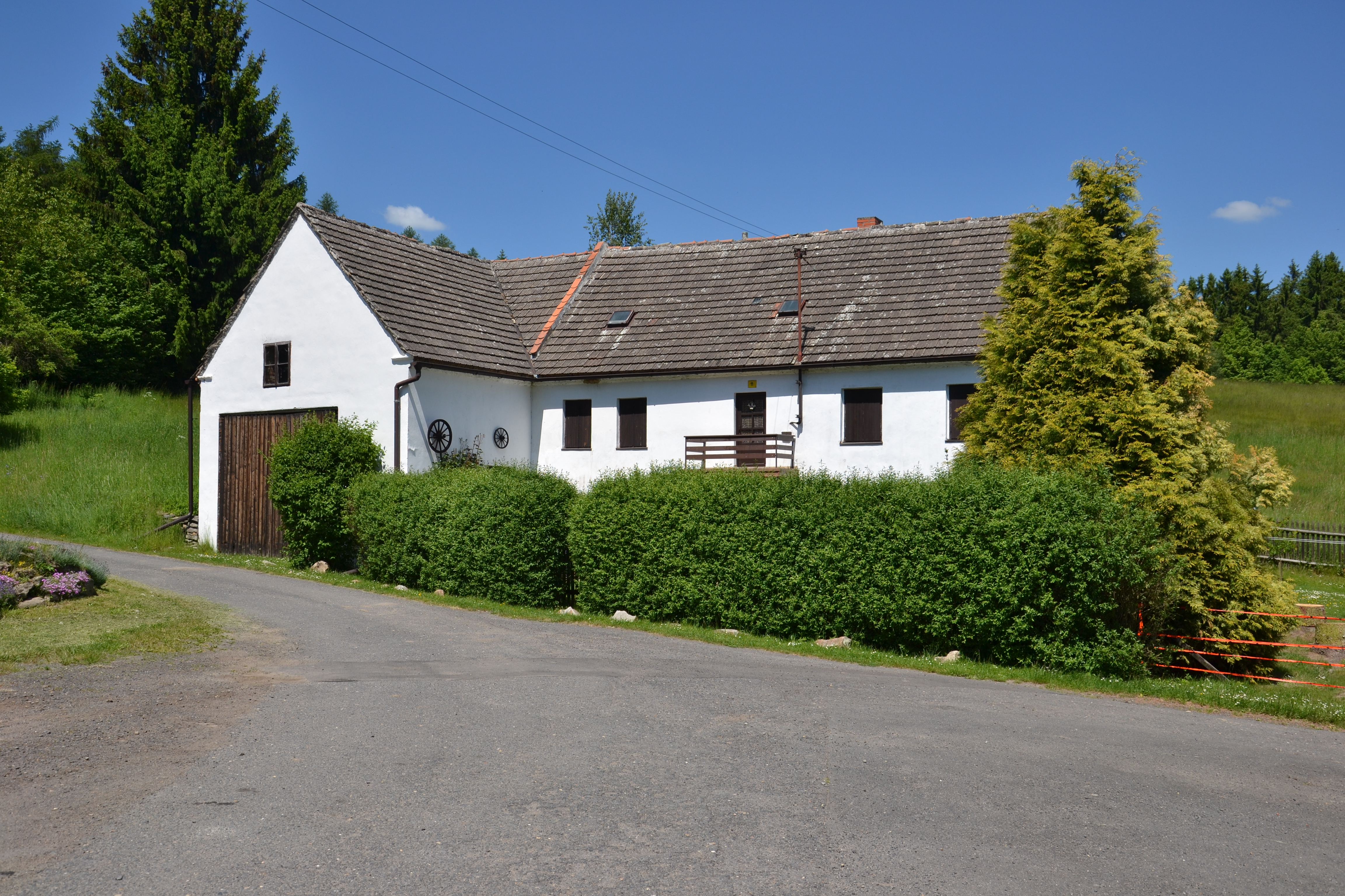 Lhotsko – dům na návsi